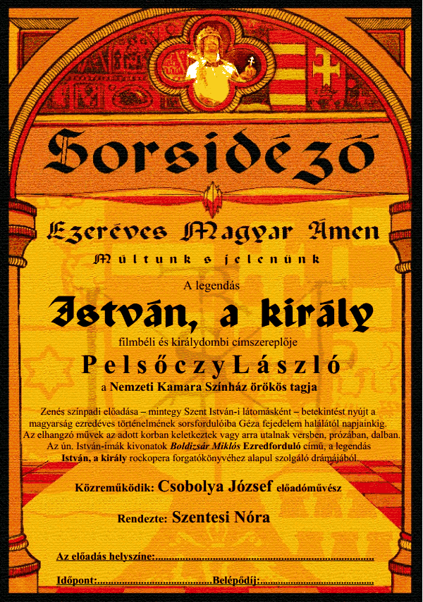 A Sorsidéző - Ezeréves magyar Ámen plakátja. Budapest.